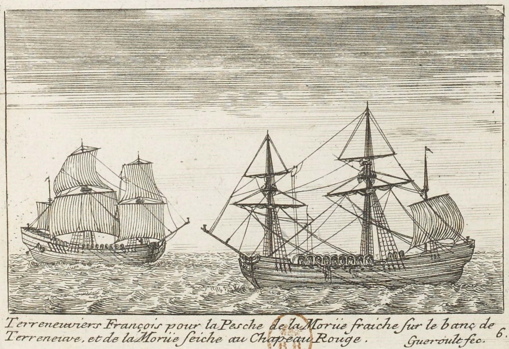 Dessin de deux terre-neuviers pour la pêche à la morue en 1710. Imagé tirée du Recüeil des vuës de tous les differens bastimens de la mer Mediterranée et de l'Océan, avec leurs noms et usages.